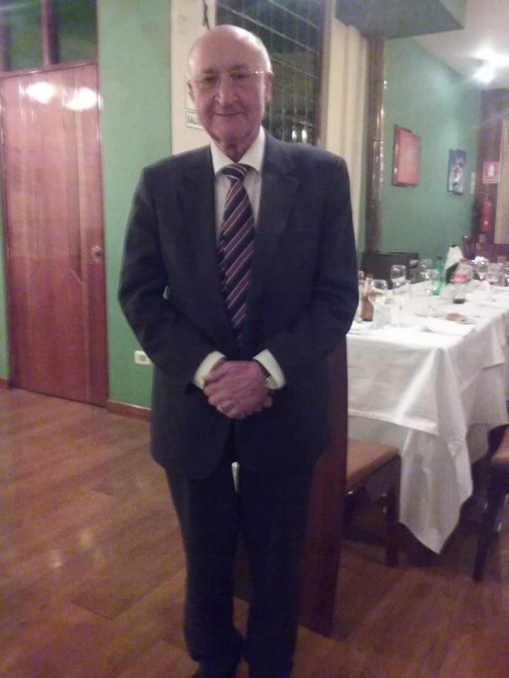 Cena del 16 de noviembre de 2016.